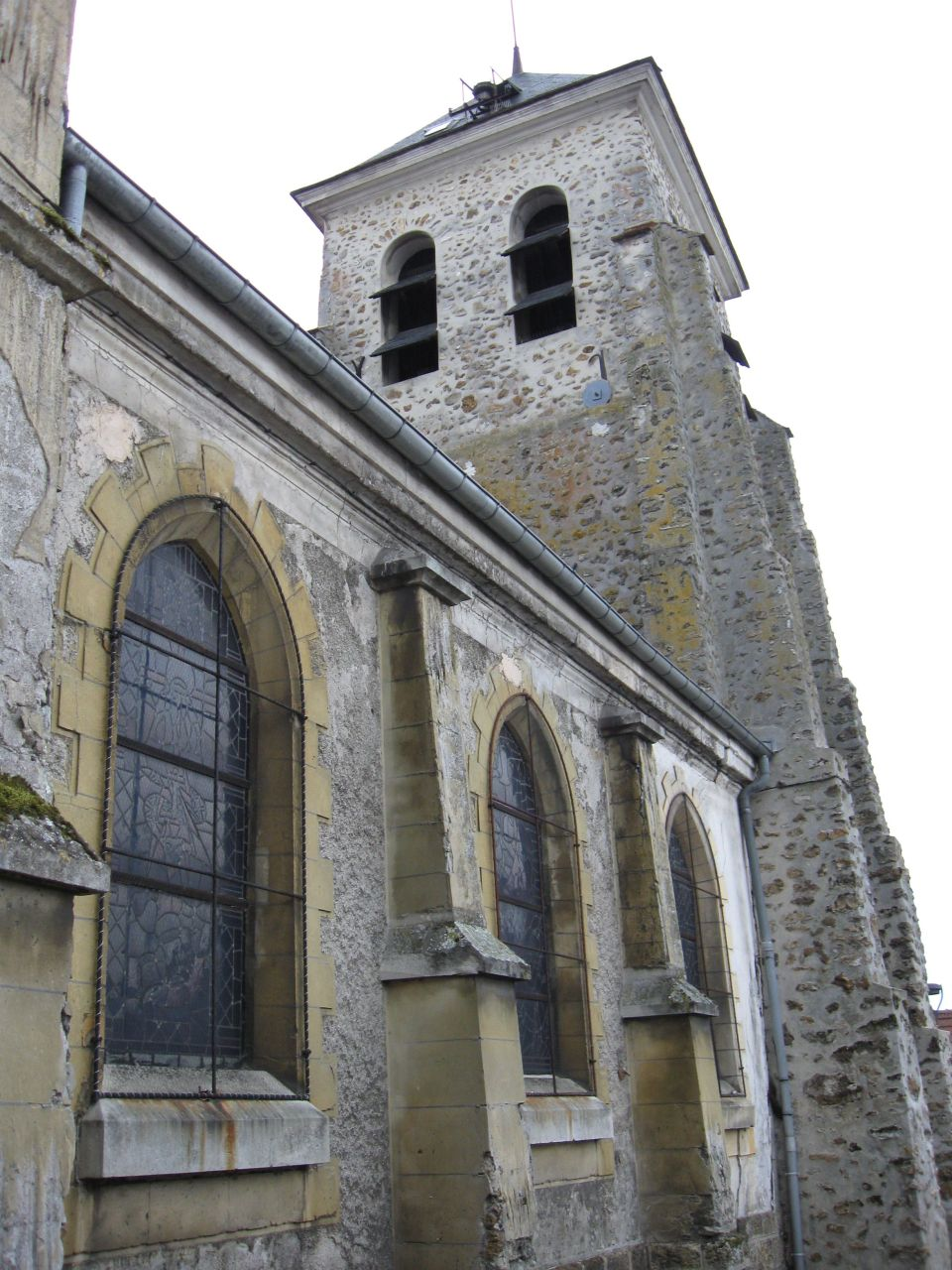 Église St Pierre St Paul de Trilport (Seine-et-Marne, région Île-de-France)